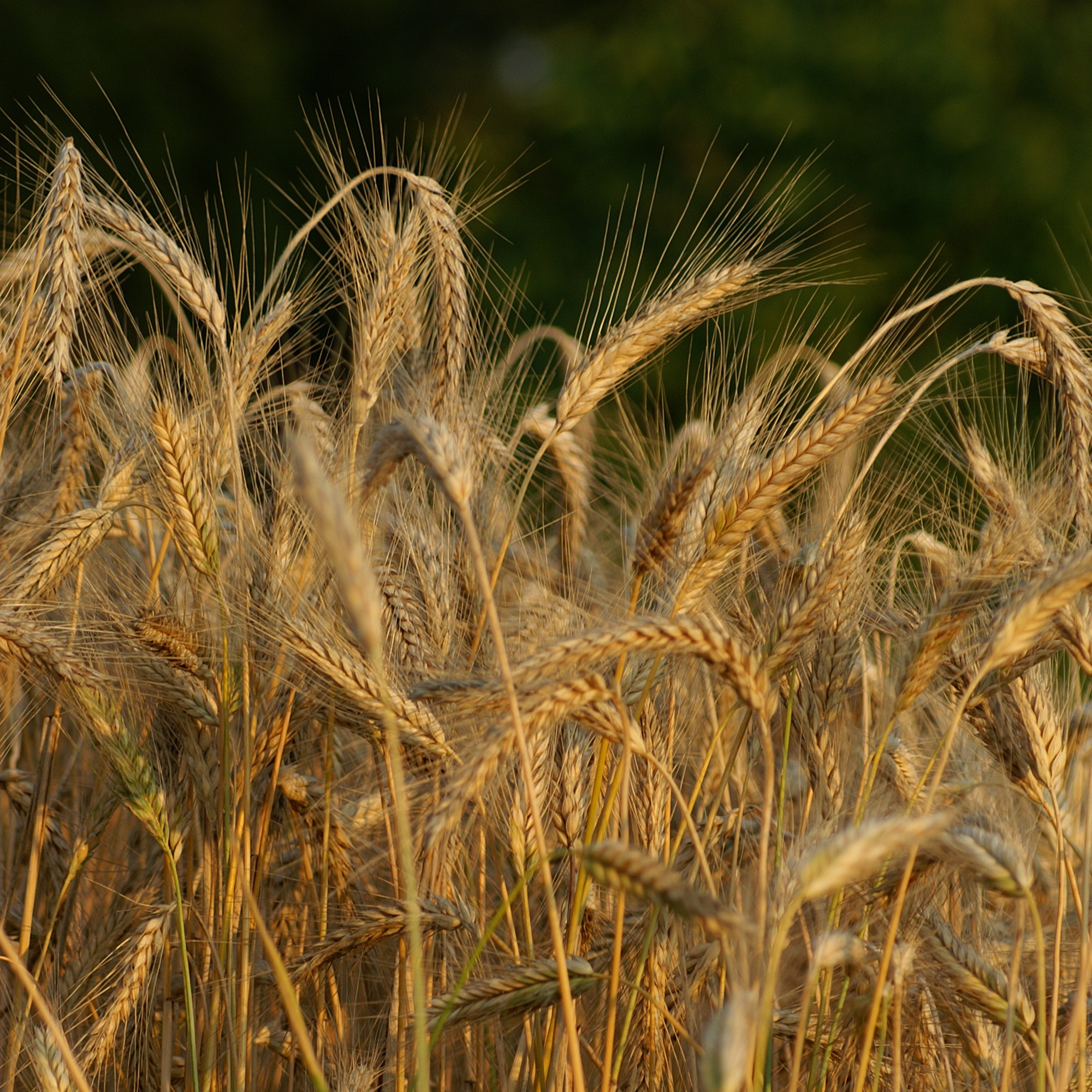 Mit Weizen wird eine Reihe von Arten der Süßgräser (Poaceae) in der Gattung Triticum L. bezeichnet. Im Bild: Weizenähren der Sorte Triticum polonicum L..